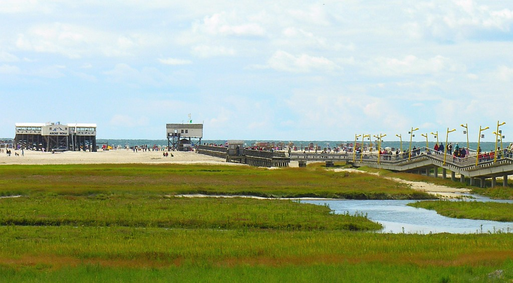 Sankt Peter-Ording Nordseeheilbad Strand Halbinsel Eiderstedt Foto 2007 Wolfgang Pehlemann Wiesbaden DSCN6311